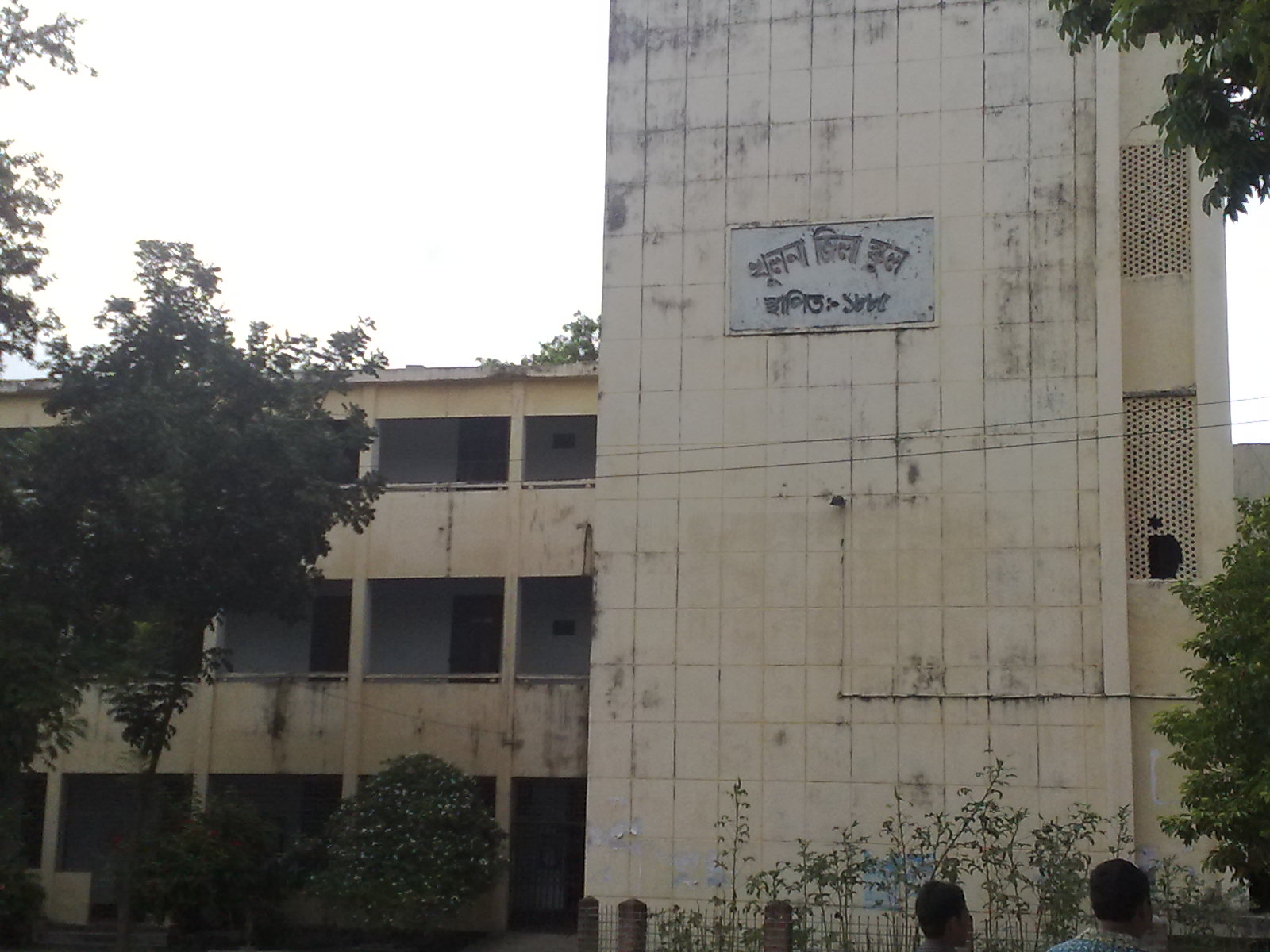 খুলনা জিলা স্কুল